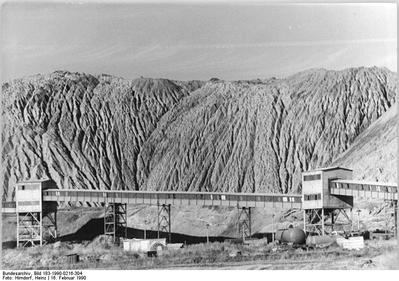 ADN-ZB / Hirndorf / 16.2.90 / pr / Bez. Erfurt: Das Bergarbeiterdorf Menteroda im Kreis Mühlhausen ist geprägt durch den Kalibergbau und berghohe Halden. 1992 feiert dieser rund 2700 Einwohner zählende Ort sein 800jähriges Bestehen.